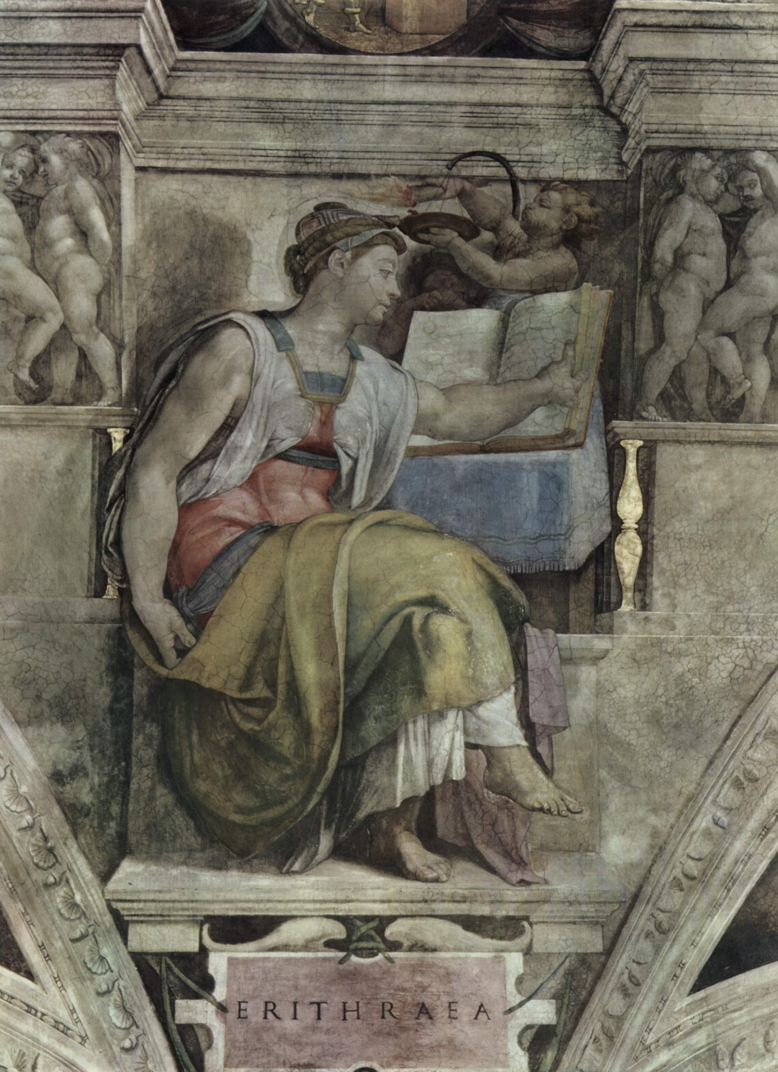 Deckenfresko zur Schöpfungsgeschichte in der Sixtinischen Kapelle, Szene in Lünette des dritten Jochs